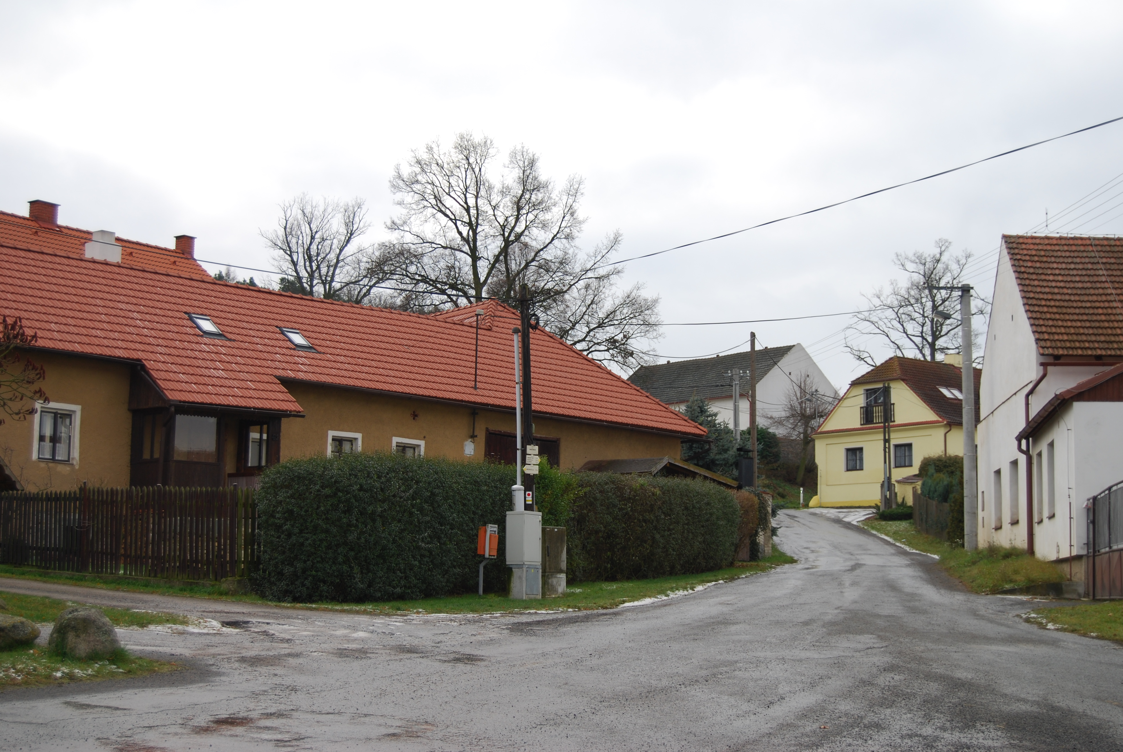 Pohled na část vesnice a náves. Martinice jsou vesnice, část města Březnice v okrese Příbram. Česká republika.